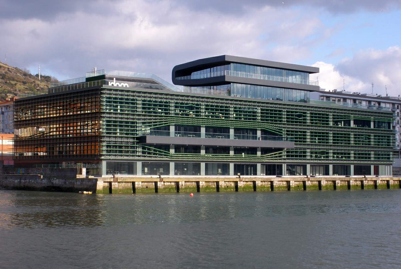 Sede del grupo de ingeniería IDOM (Bilbao)